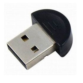 Foto ilustrativa de um dispositivo usb adaptador de bluetooth